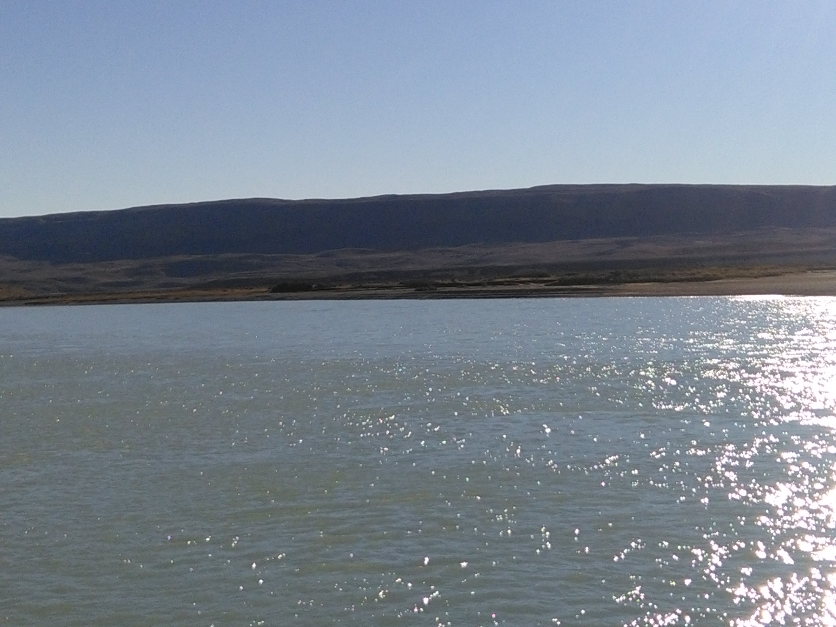 Mirando el Lago.